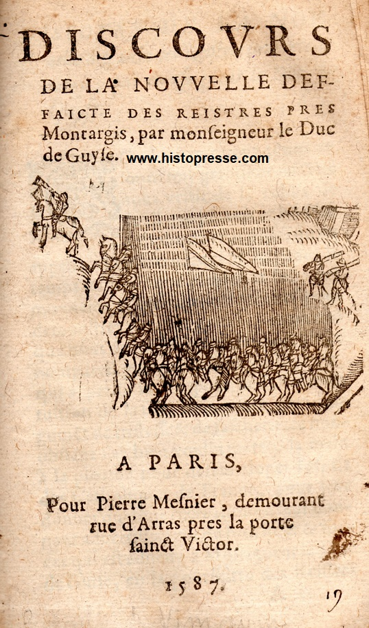 Cette photo est celle d'un occasionnel, ancêtre de la presse issu de mes collections. Les occasionnels ont précédé la publication de la presse régulière dès le 16e siècle.